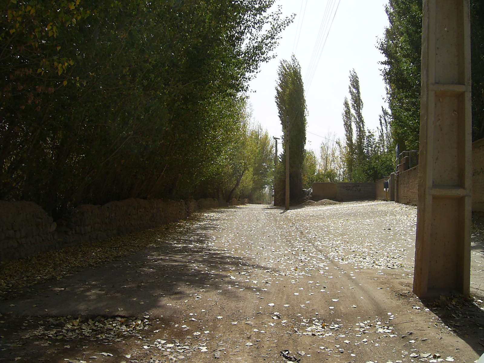 عنبران